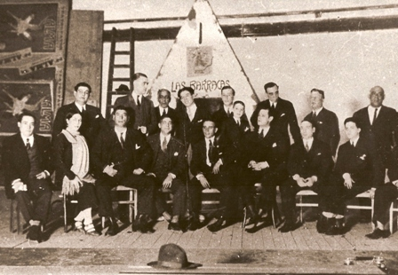 Entrega de la segunda Llave de Oro del Cante a Manuel Vallejo en 1926 en el teatro Pavón. Junto al galardonado se encuentran Manuel Torre y otros artistas.